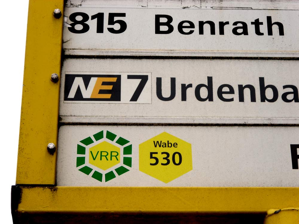 Bushaltestelle mit "VRR"